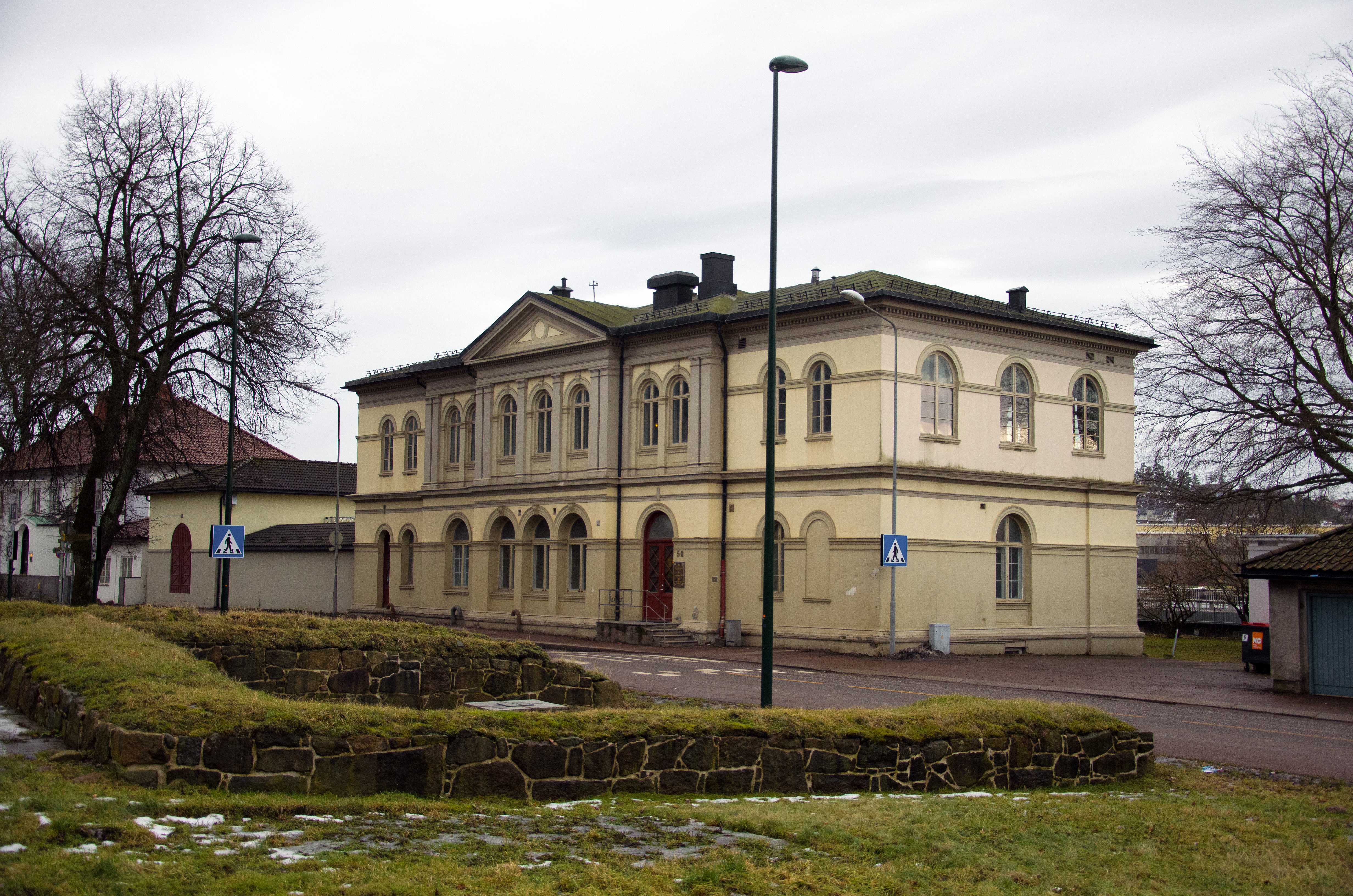 Nedre Langgate 50, gamle Tønsberg Jernbanestasjon. Byggeår: 1881. Arkitekt: Balthazar Lange.